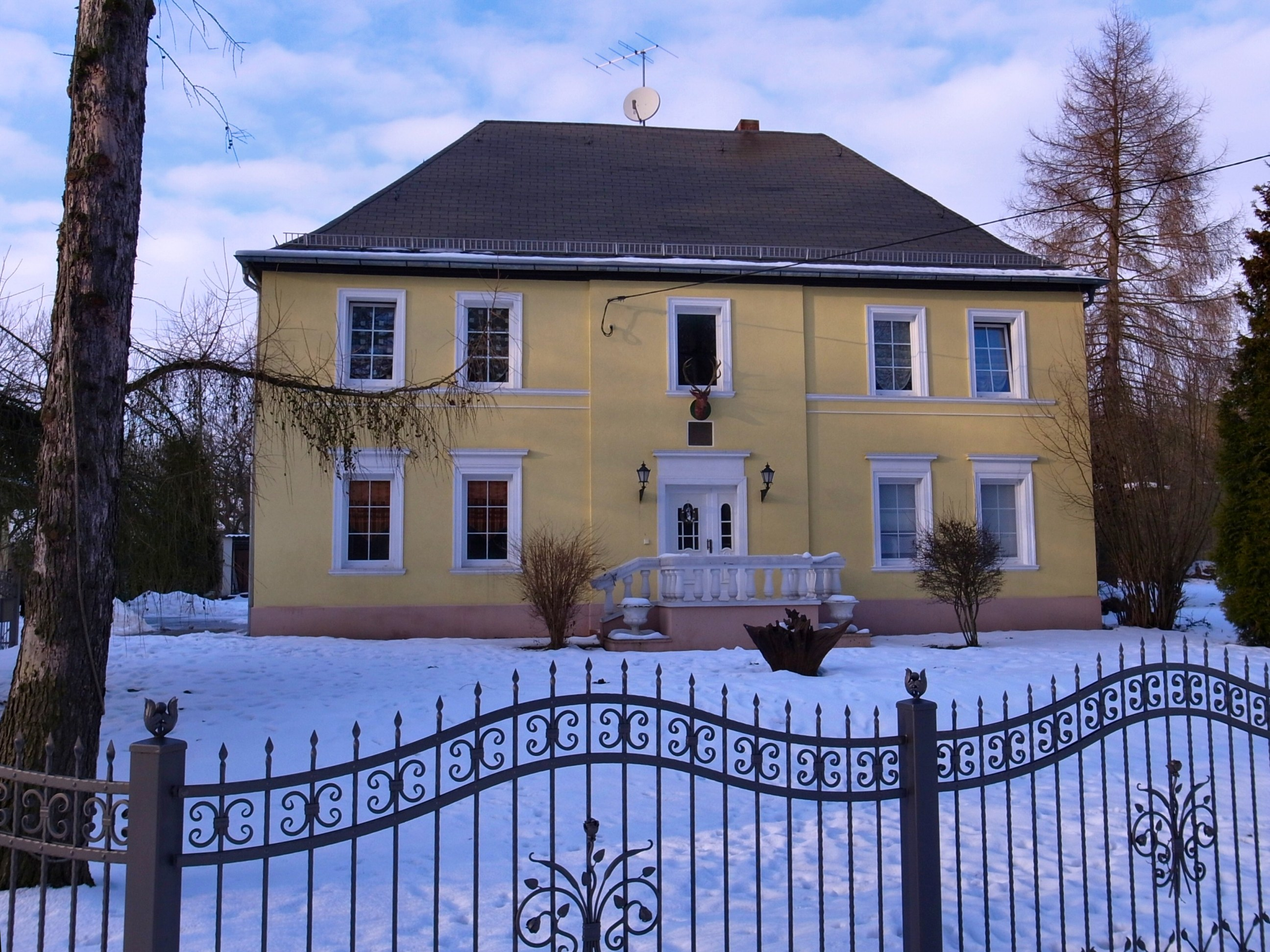 Jeßnitz (Anhalt), ehemaliges Forsthaus Salegast